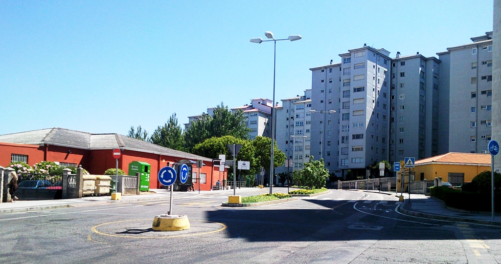 O Birloque na Coruña